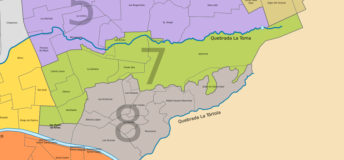 División barrial comuna 7, Neiva, departamento de Huila